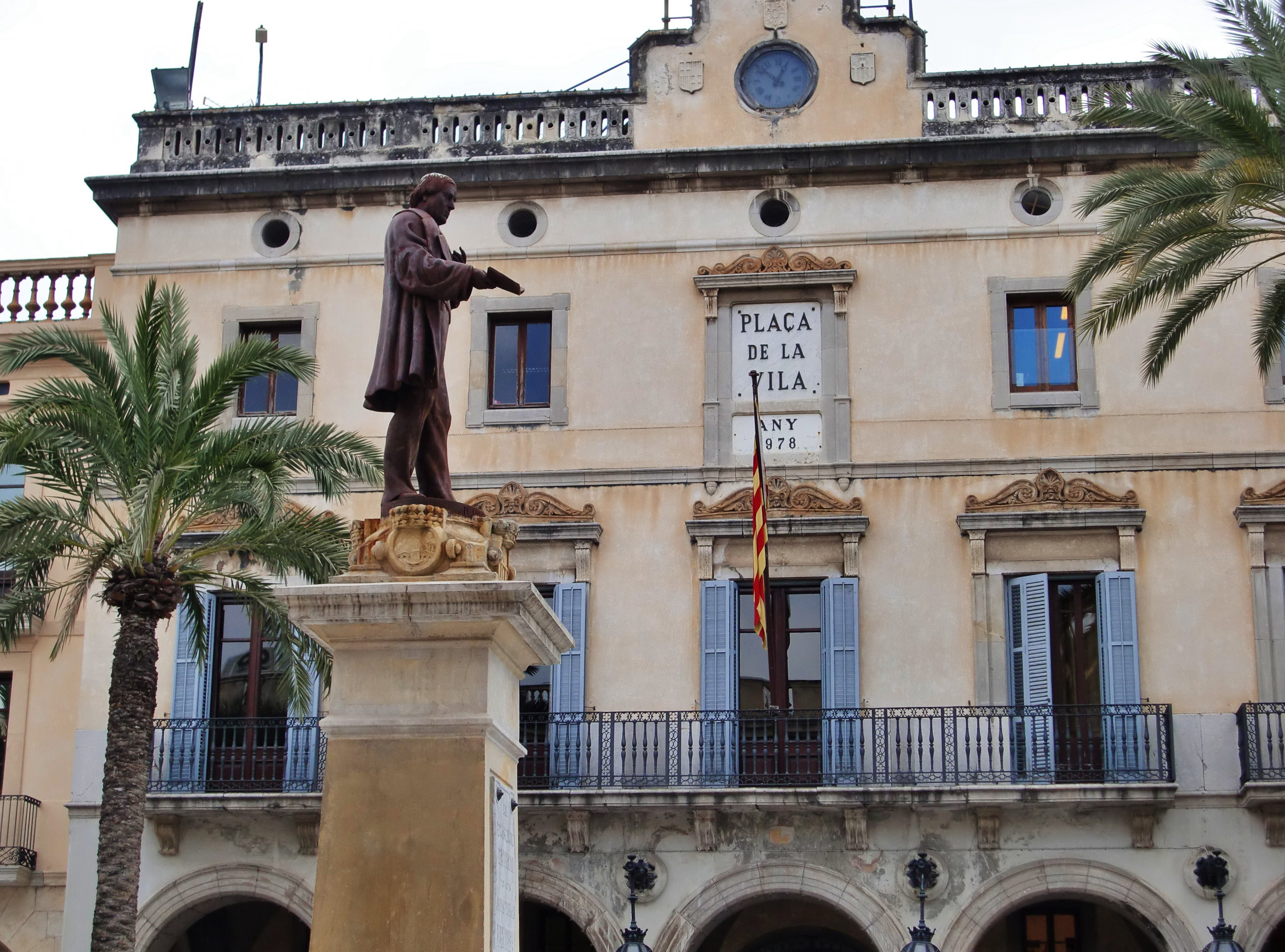 Monument a Josep Tomàs Ventosa i Soler (1797-1874), a la plaça de la Vila de Vilanova i la Geltrú. Fou un polític i comerciant que emigrà a Cuba l'any 1809, amb tan sols 12 anys.